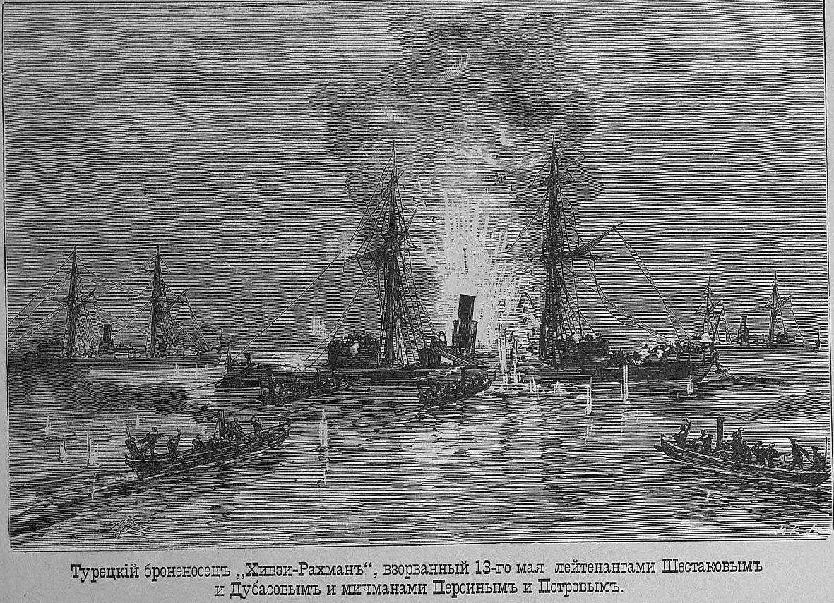 Потопление турецкого броненосца Хивзи Рахман